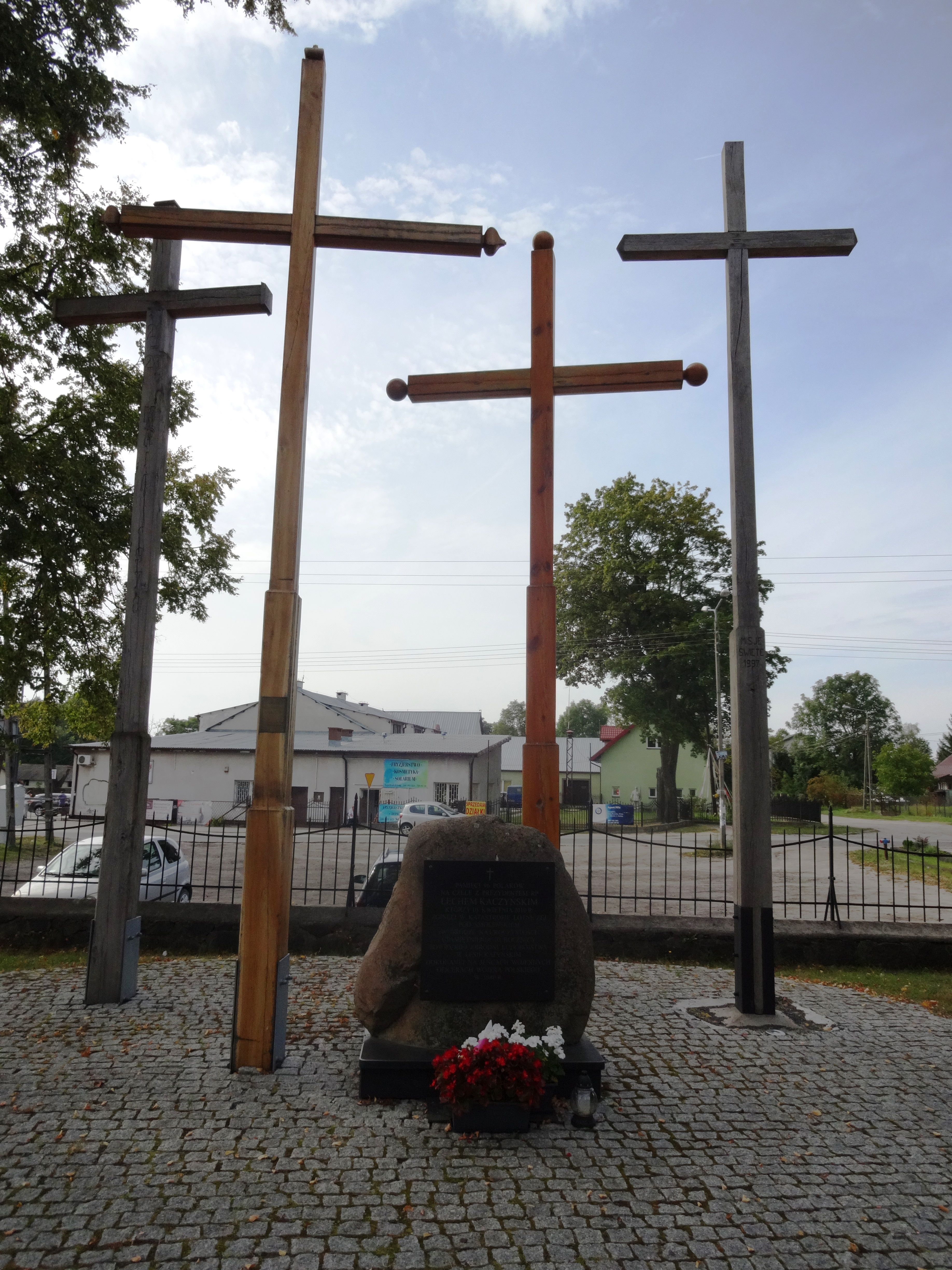 Krzyże pamiątkowe na dziedzińcu kościoła w Gliniance